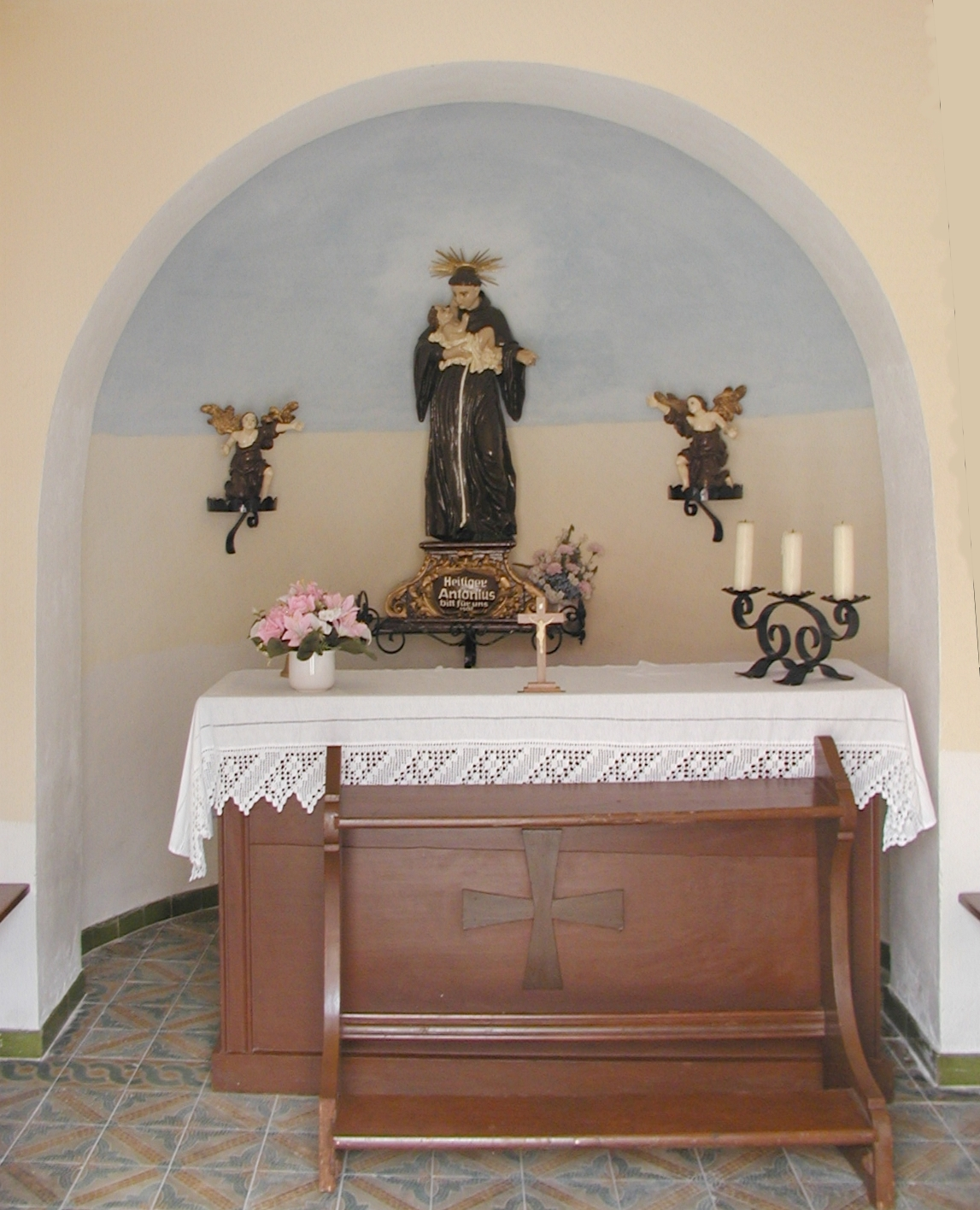 Apsis der Ortskapelle Kleinkirchberg